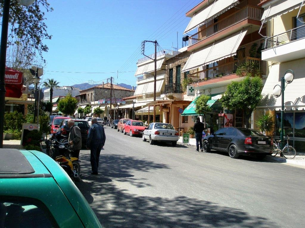 Μώλος, κέντρο